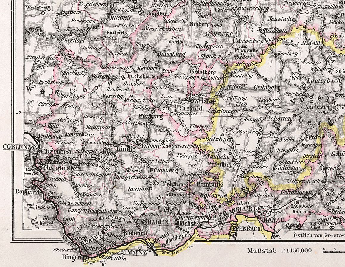 Kartografische Ansicht des Kampfgebietes um Limburg